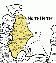 old Viborg Amt, Denmark Source: 'Map by Svend-Erik Christiansen